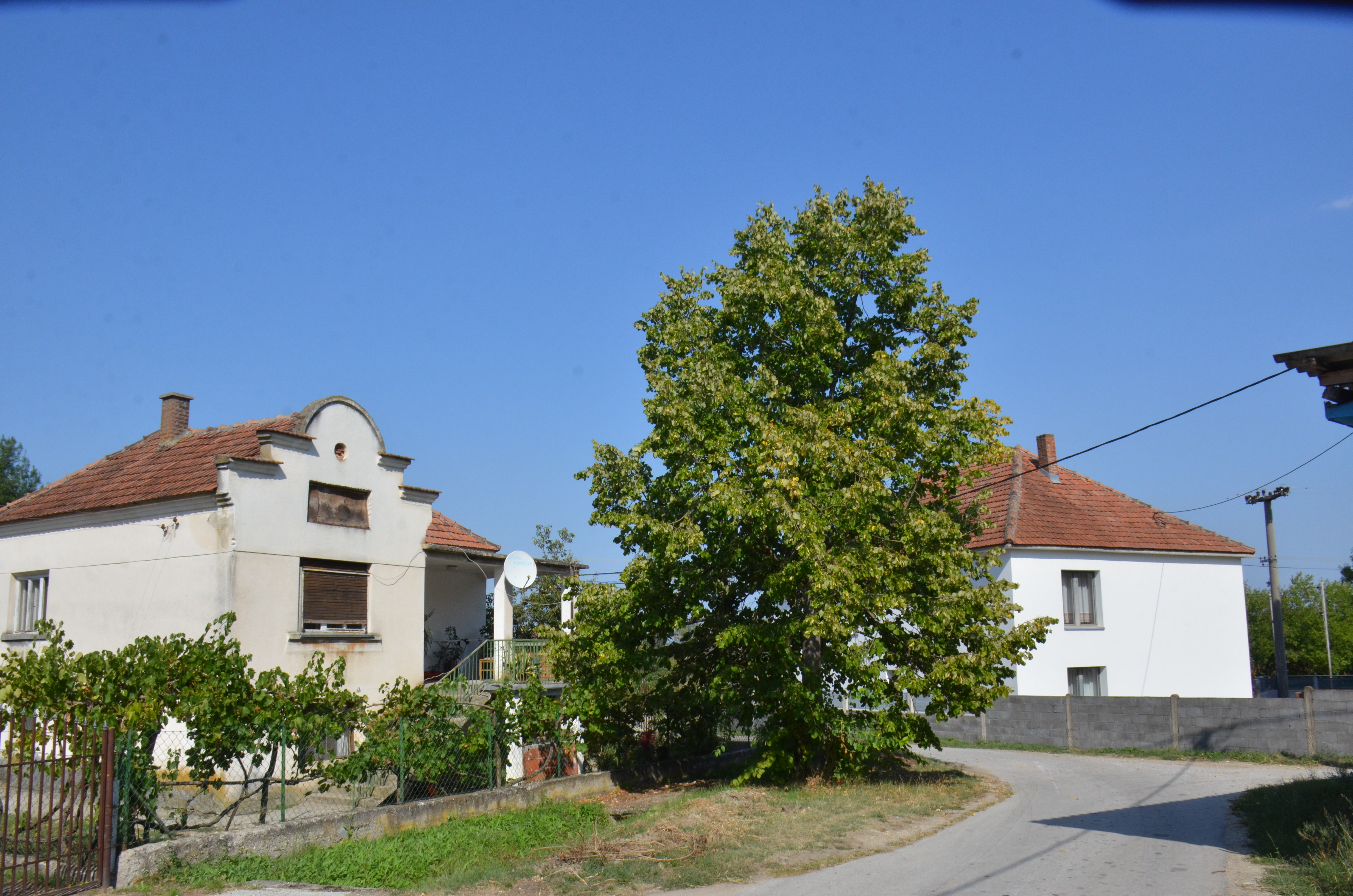 Српски (ћирилица): Запис - липа, село Рибник, Општина Јагодина, Поморавски округ, Србија